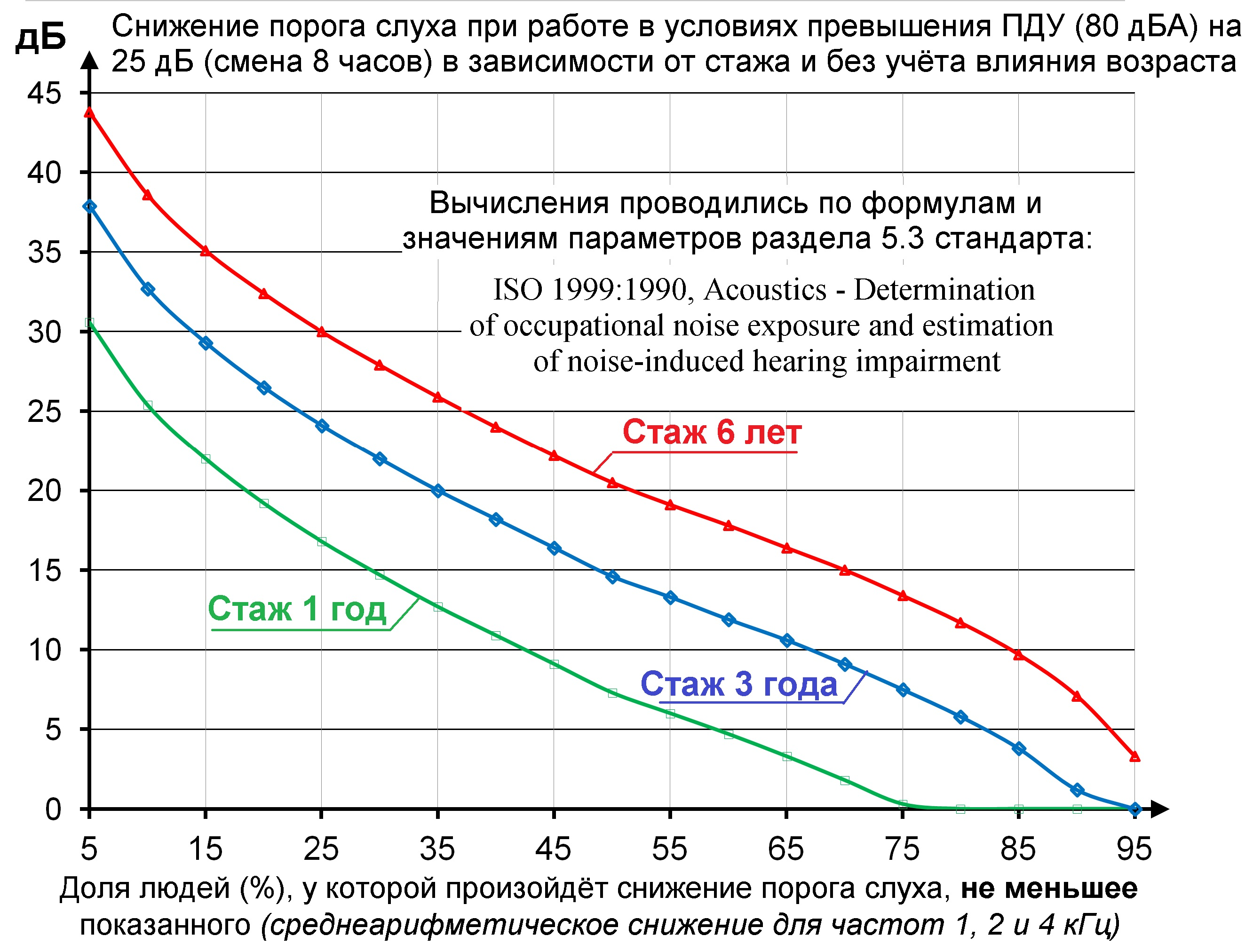 Графики показывают, какое снижение порога слуха (среднеарифматическое значение для частот 1, 2 и 4 кГц) может произойти у людей, работающих в условиях превышения предельно-допустимого уровня (ПДУ = 80 дБА в РФ) на 25 дБ в течение 1, 3 и 6 лет (8-часовая смена) без учёта влияния возрастного ухудшения слуха и использования СИЗ. Видно, что отличия в "индивидуальной живучести" приводят к тому, что в одинаковых условиях у части людей снижение очень значительное, а у части - небольшое (при стаже 1 год у ~четверти рабочих может отсутствовать ухудшение постоянного порога восприятия звука на этих частотах). В сочетании с непредсказуемой эффективностью средств индивидуальной защиты (СИЗ) органа слуха это показывает, что для предотвращения ухудшения здоровья у всех рабочих должны проводиться периодические медосмотры с аудиометрией